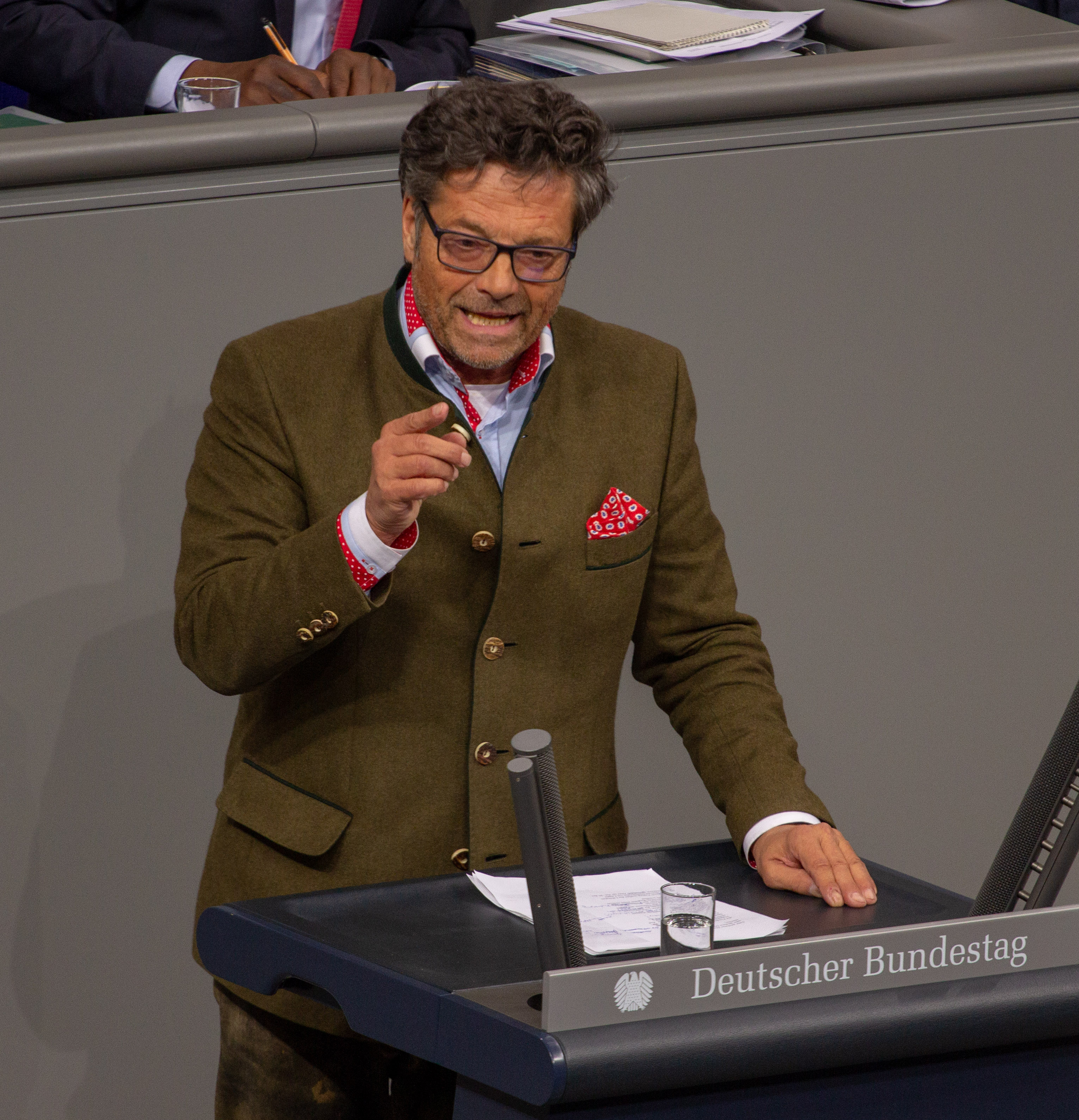 Diether Dehm, Mitglied des Deutschen Bundestages, während einer Plenarsitzung am 11. April 2019 in Berlin.